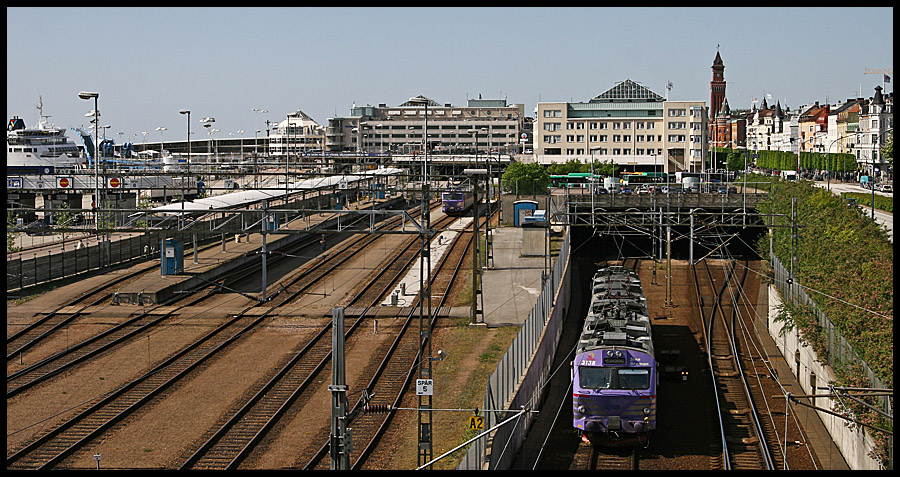 Pågatåg påväg ner till Helsingborg C